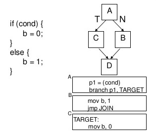 պռե